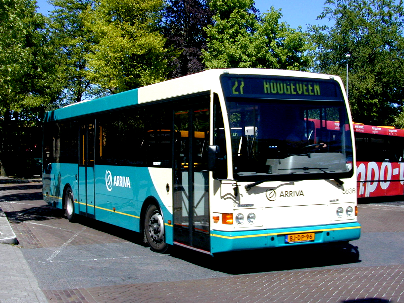 Arriva bus 5836 van het type DAF Bus SB220LF575/Berkhof 2000NL te Emmen.